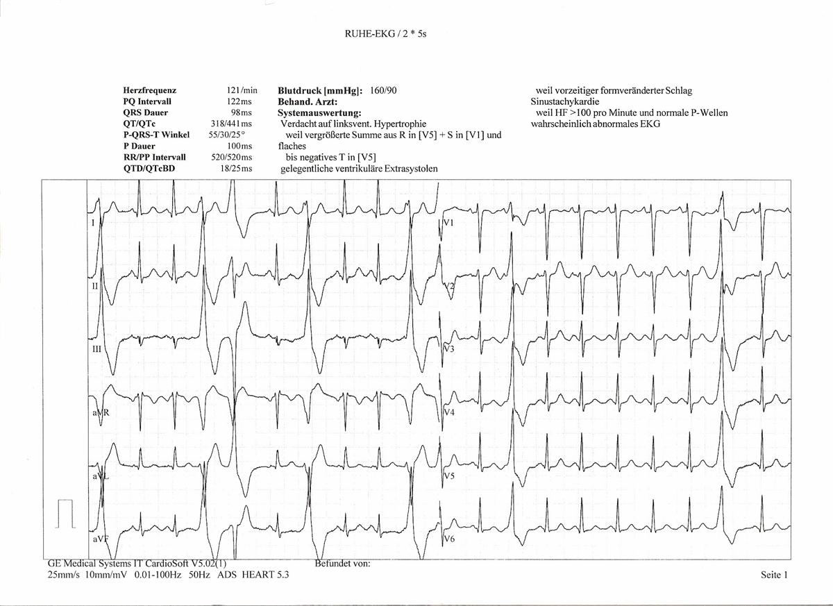 An abnormal 12 channel ECG.